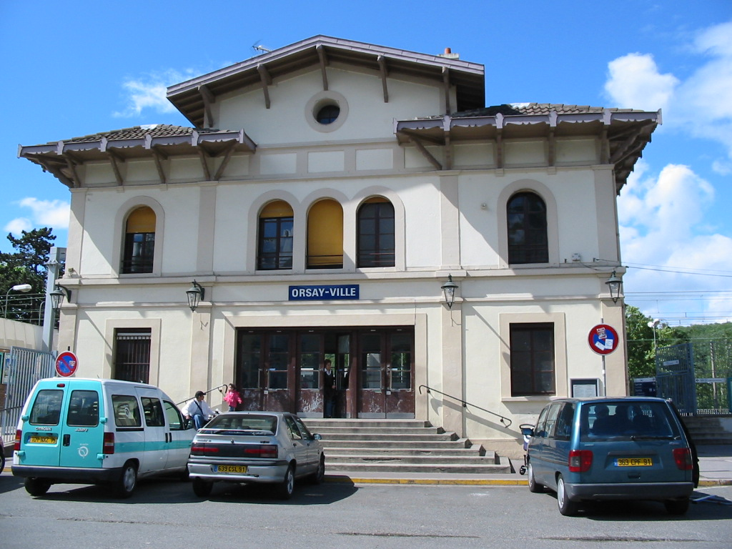 Gare de Orsay-Ville, RER B, France